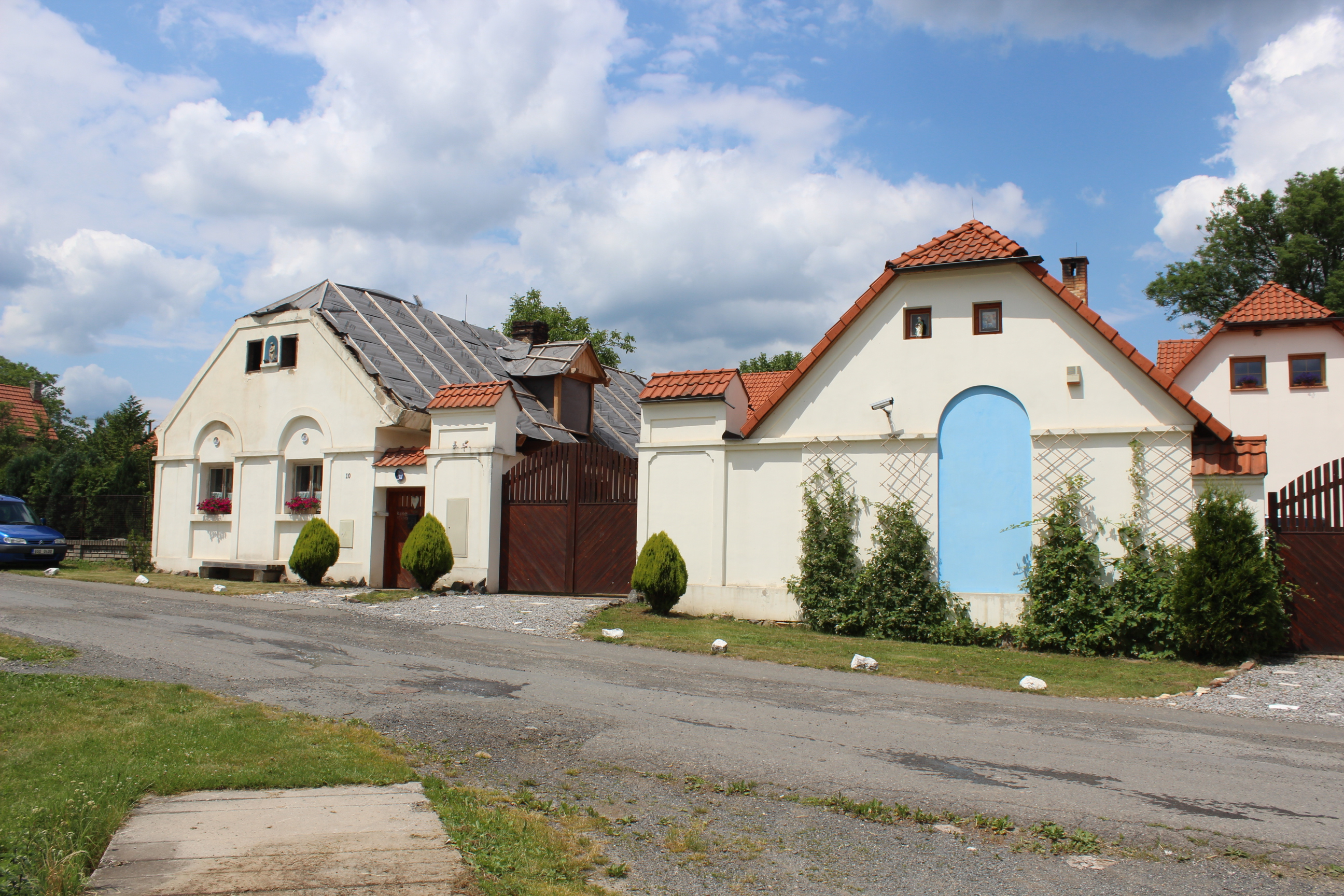 Památkově chráněný dům číslo 10 v Bratronicích v kladenském okrese.